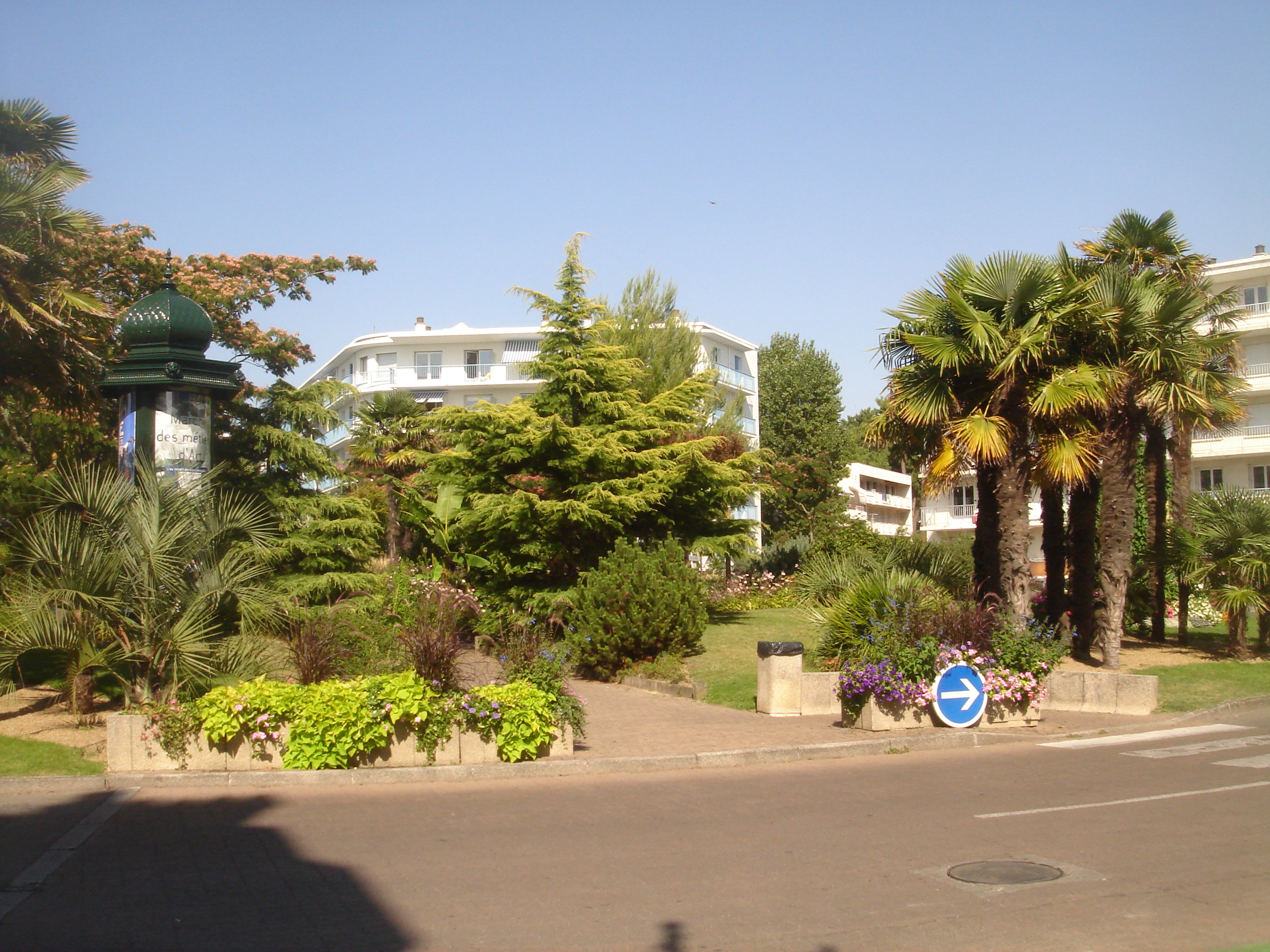 Place des palmiers, La Baule-les-Pins, Loire-Atlantique, France